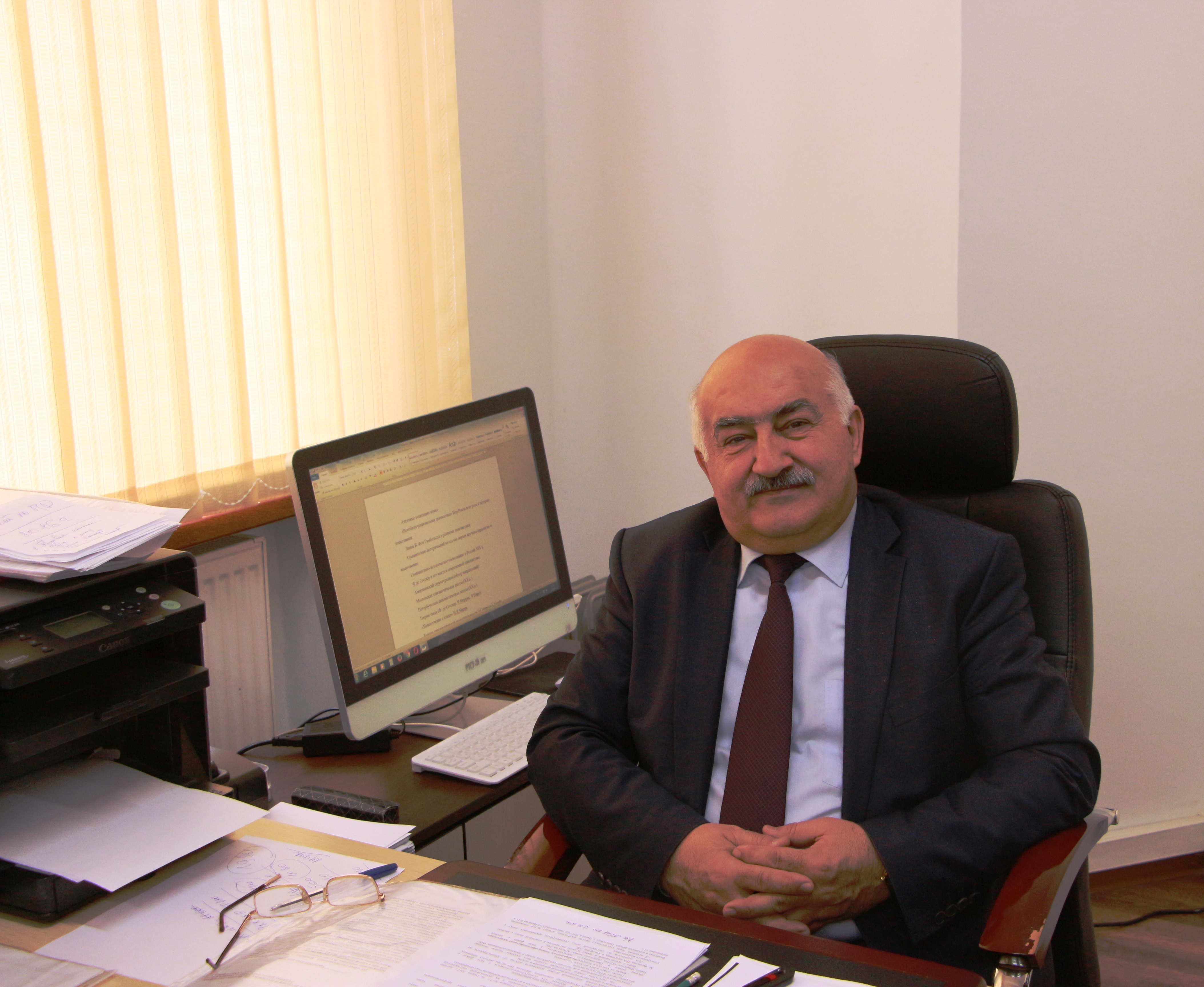 Хусрав Шамбезода, филолог, докт. фил. наук, профессор РТСУ, Таджикистан